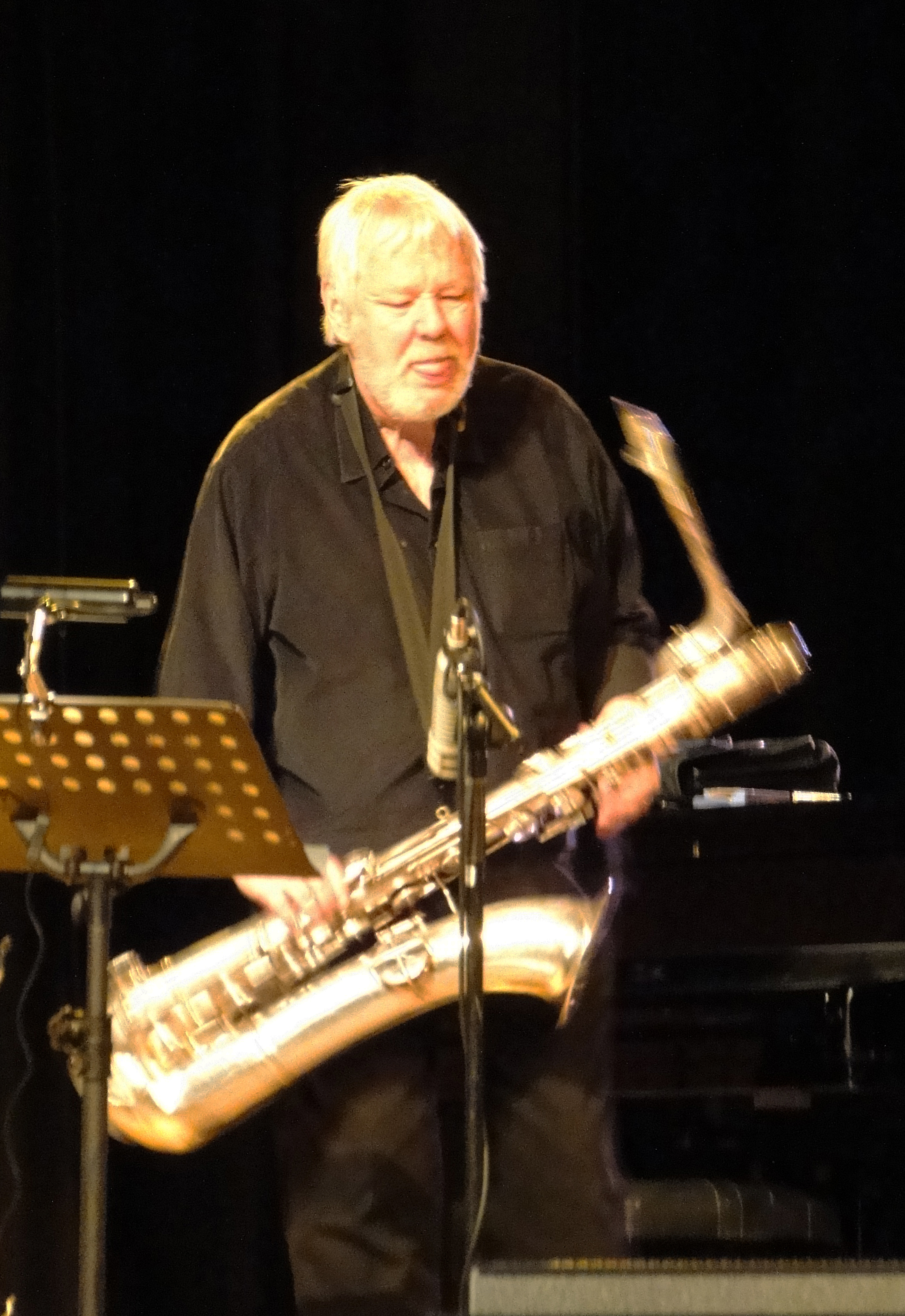 Ekkehard Jost, als Bandleader des "Ekkehard-Jost-Oktetts", auf dem Hofheimer Jazz Festival 2009.